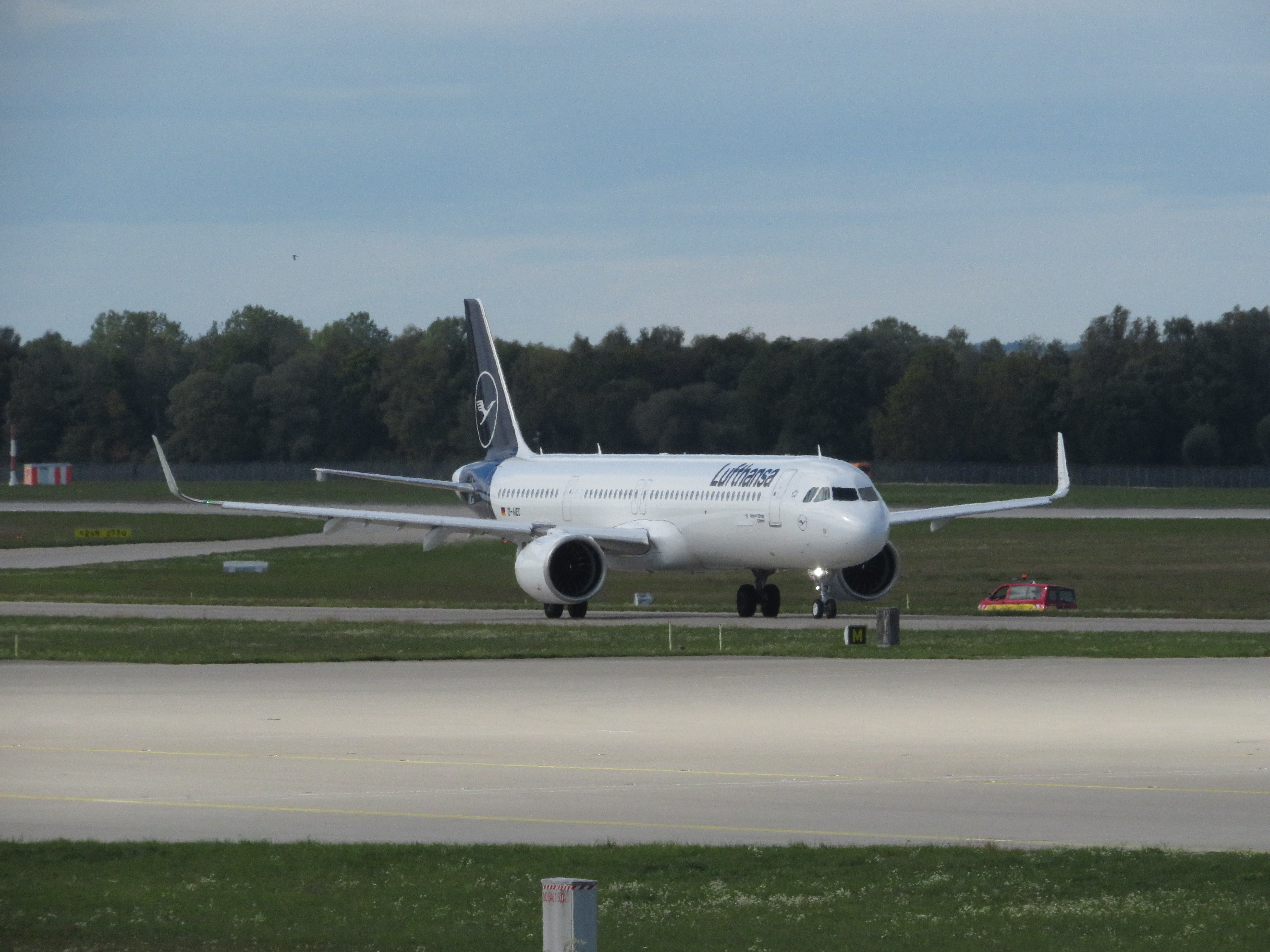 Lufthansa A321NEO D-AIEC 2019-10-01 Munich Airport Airbus A321-271neo cn/serial number: 8814